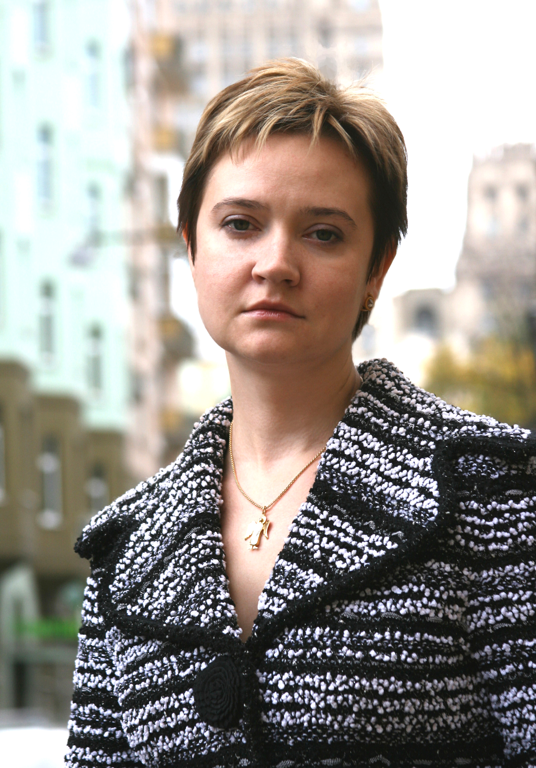 Член Общественной палаты Российской Федерации Ольга Костина.